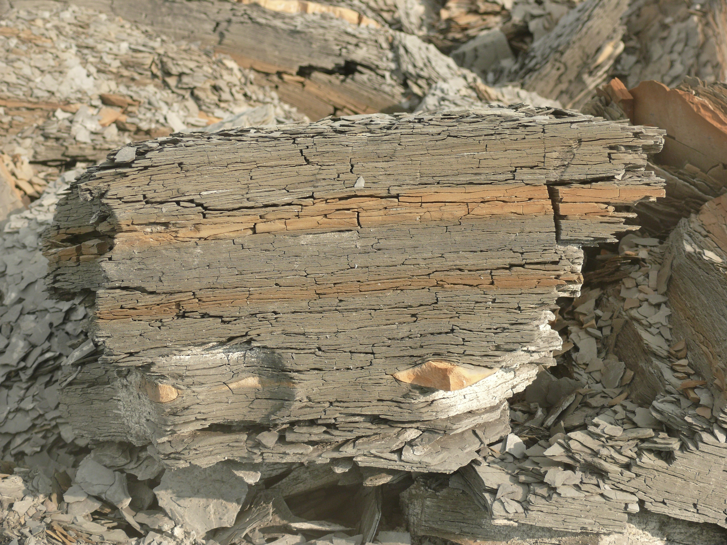 Opalinuston, Albvorland, Deutschland